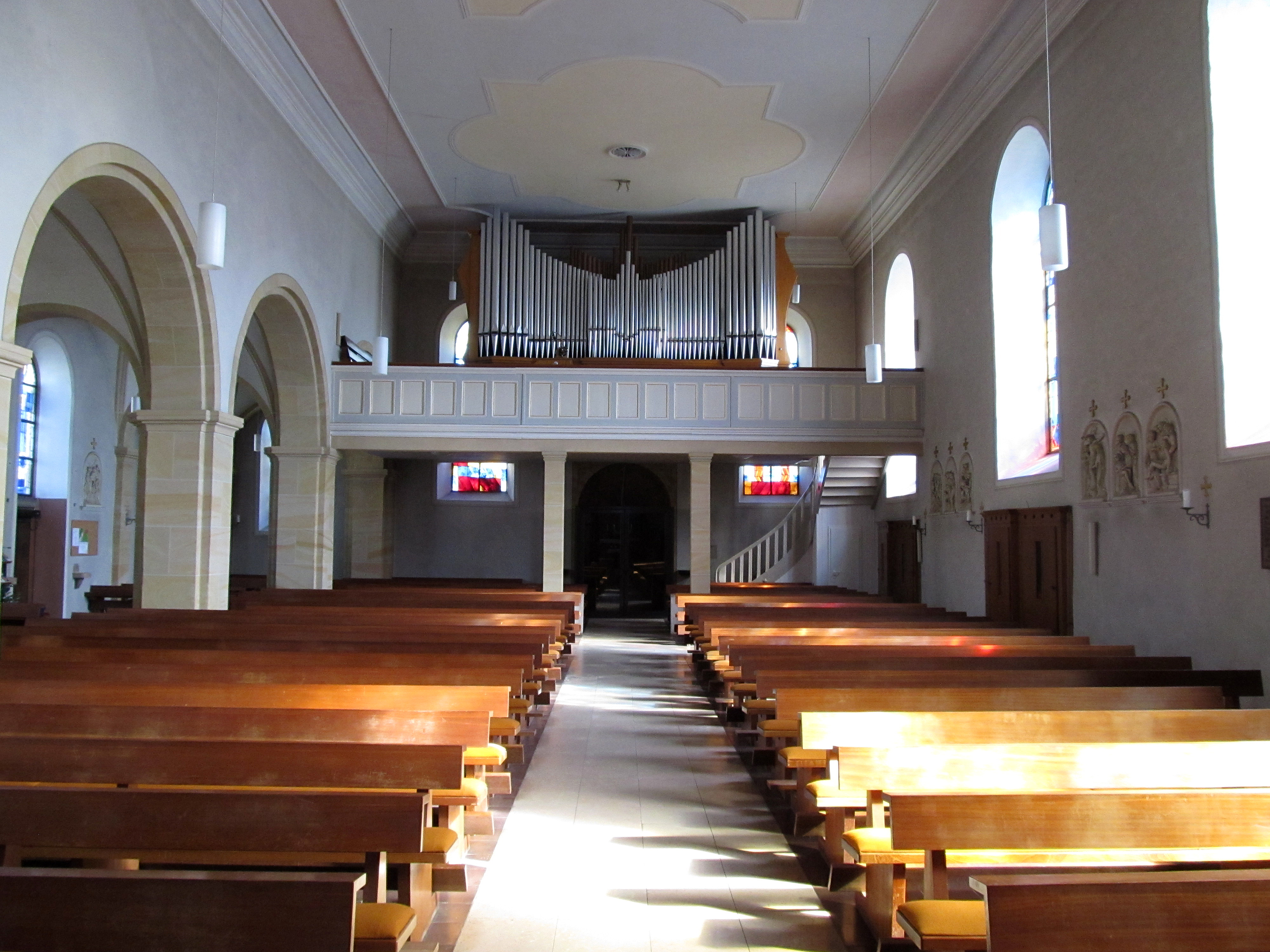 Blick ins Innere der katholischen Pfarrkirche St. Mauritius in Rubenheim, einem Ortsteil der Gemeinde Gersheim, Saarland